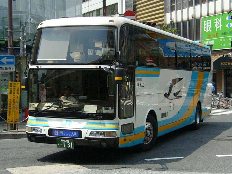 登録番号 高知200か・131 ジェイアール四国バス(JR Shikoku bus)高知支店所属 龍馬エクスプレス号(Ryoma Express)用 三菱ふそう・エアロクィーン KC-MS822P